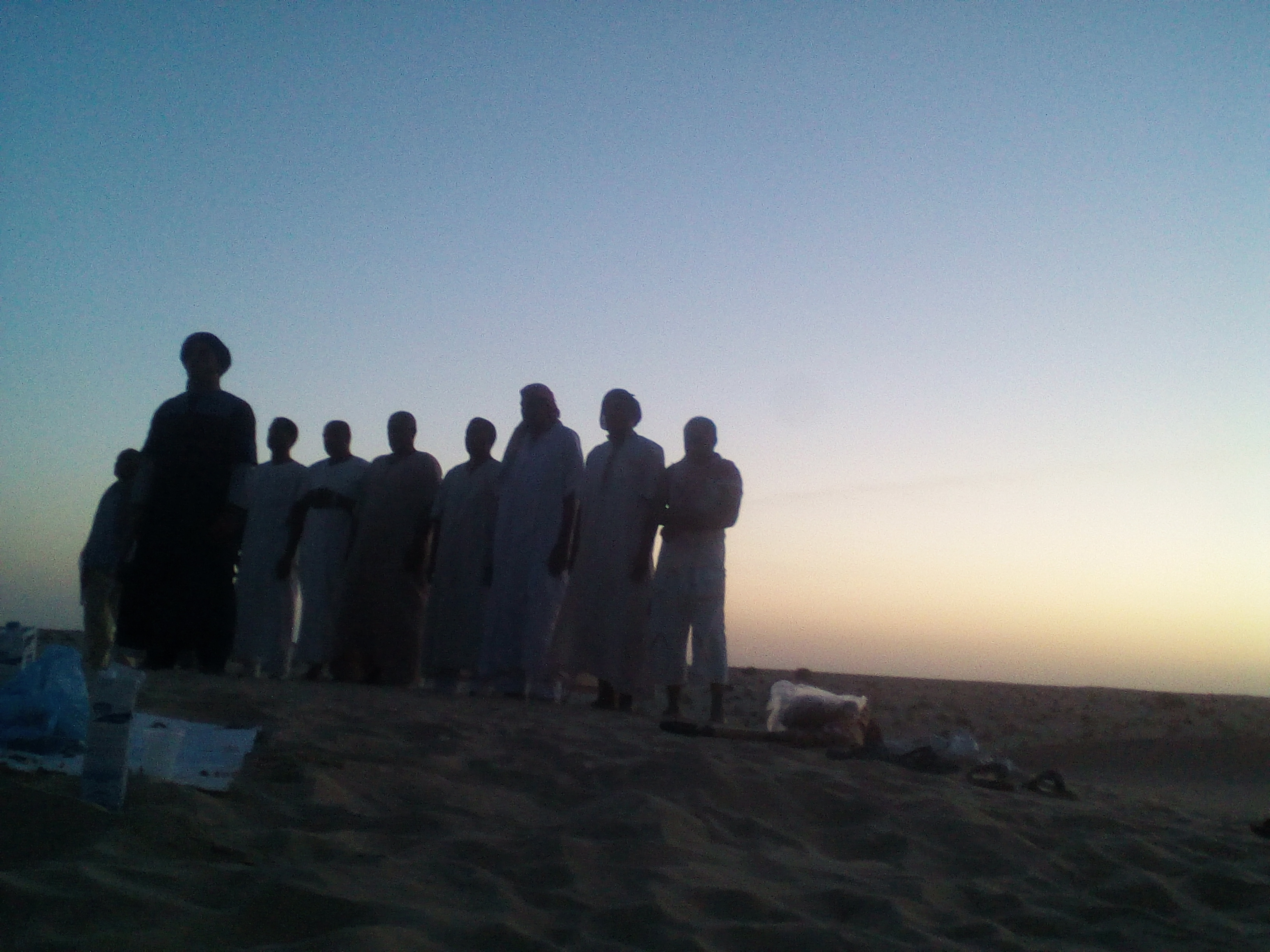 Sahra de taibet